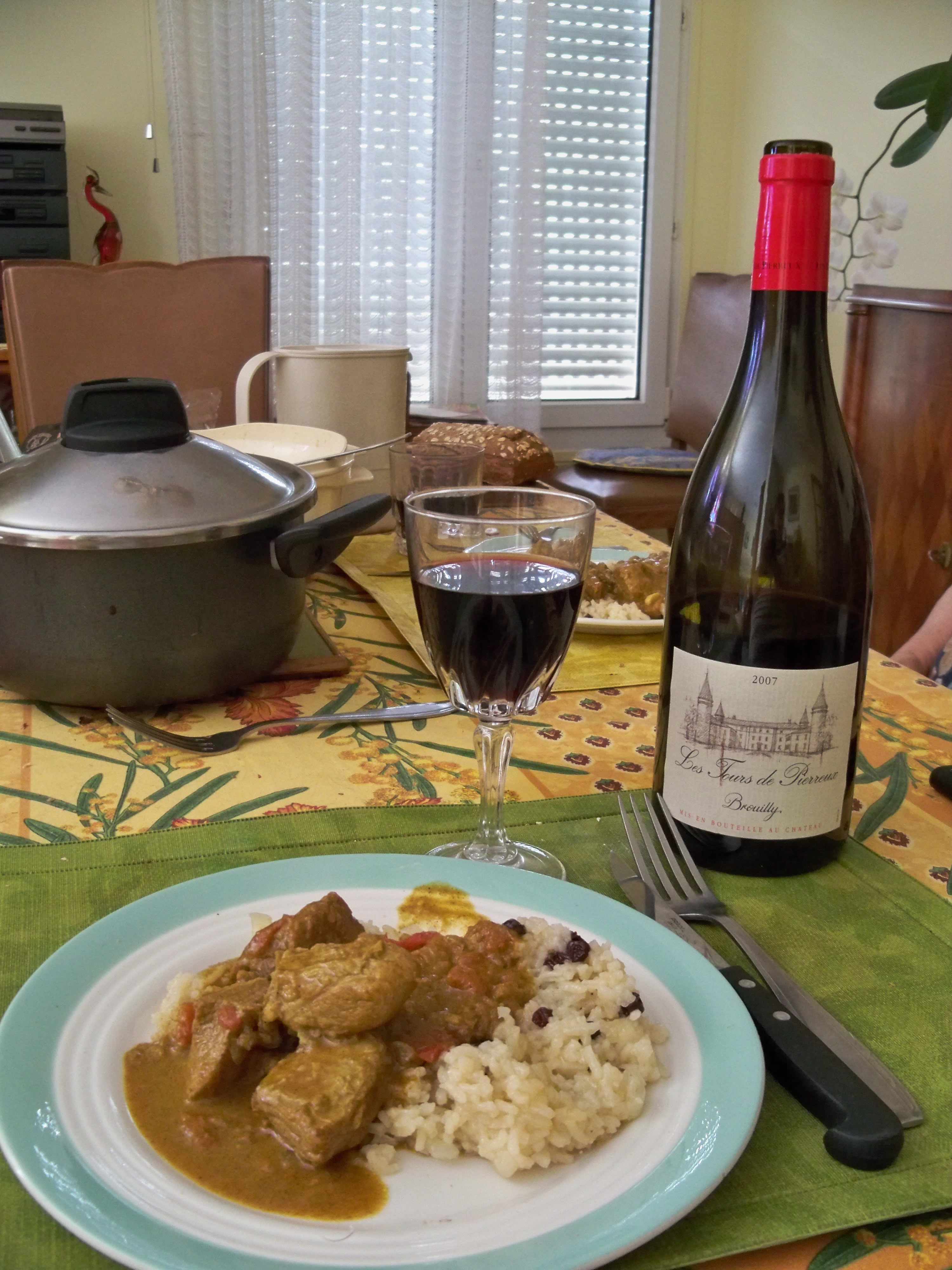 Colombo de porc et bouteille de Brouilly AOC